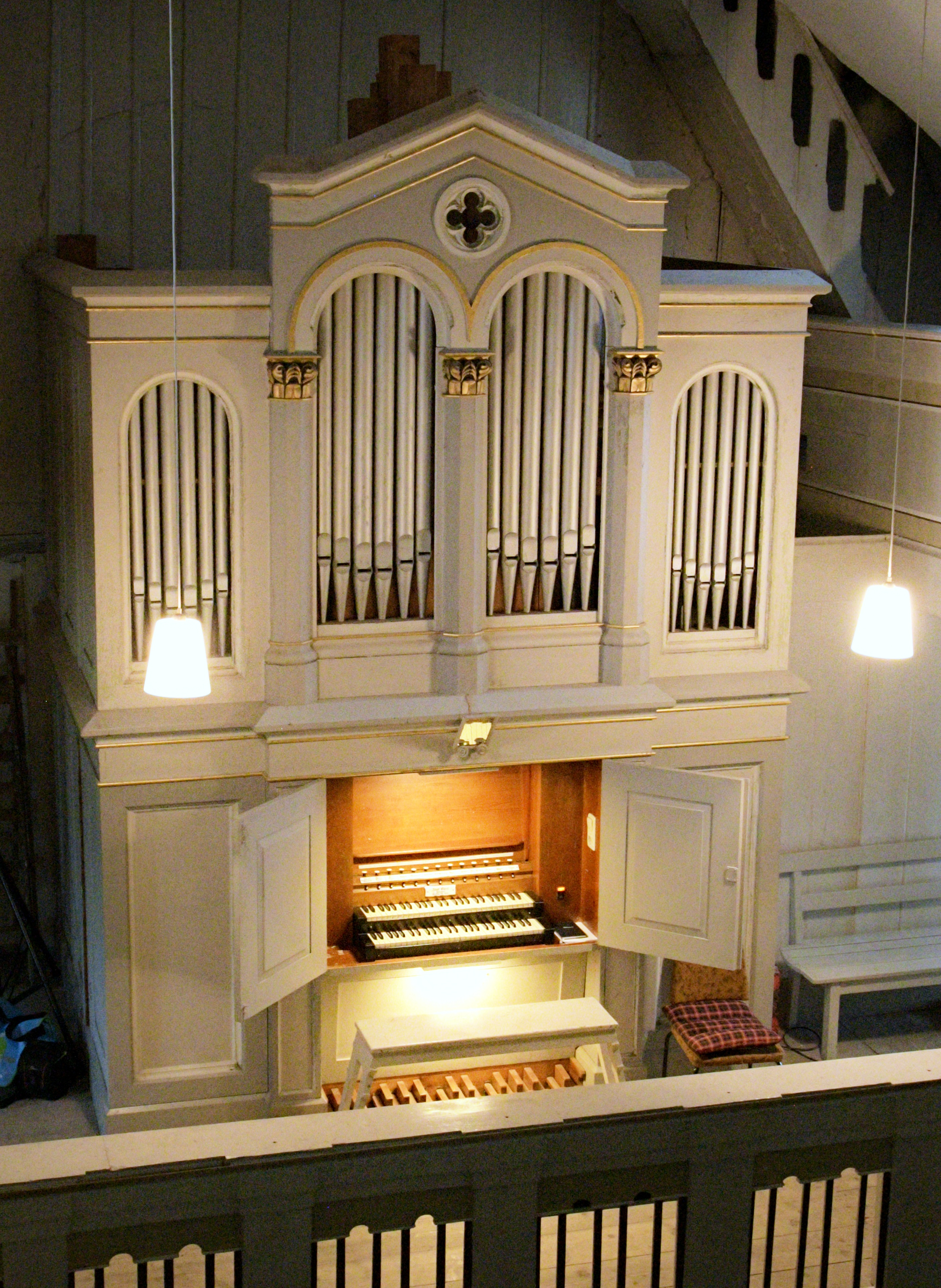 Eifert-Orgel in der Kirche von Ilmenau-Roda, erbaut im Jahre 1887 durch Ad. Eifert, Stadtilm.